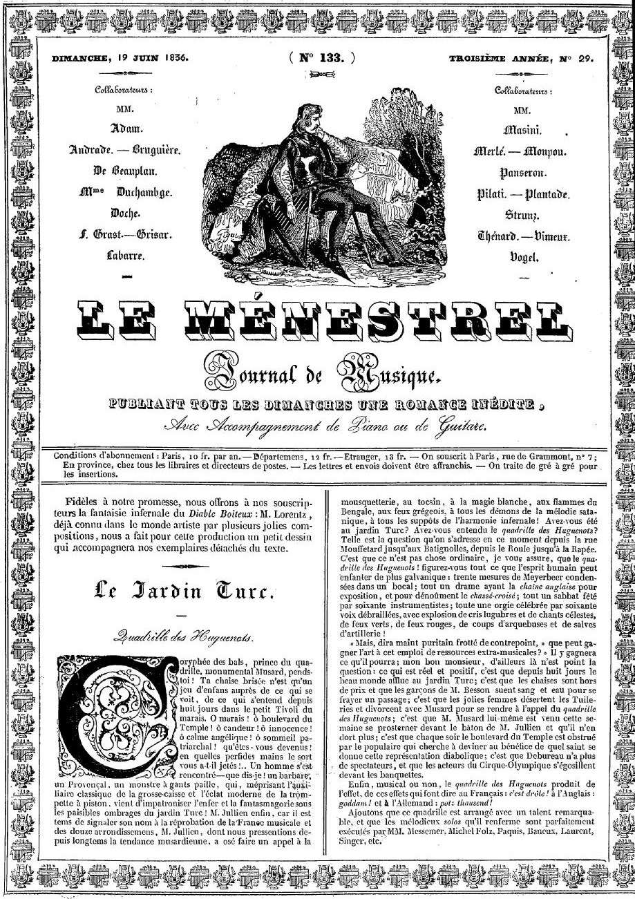 Article sur le quadrille des Huguenots donné par Jullien au Jardin Turc à Paris. Il parle aussi de Philippe Musard.